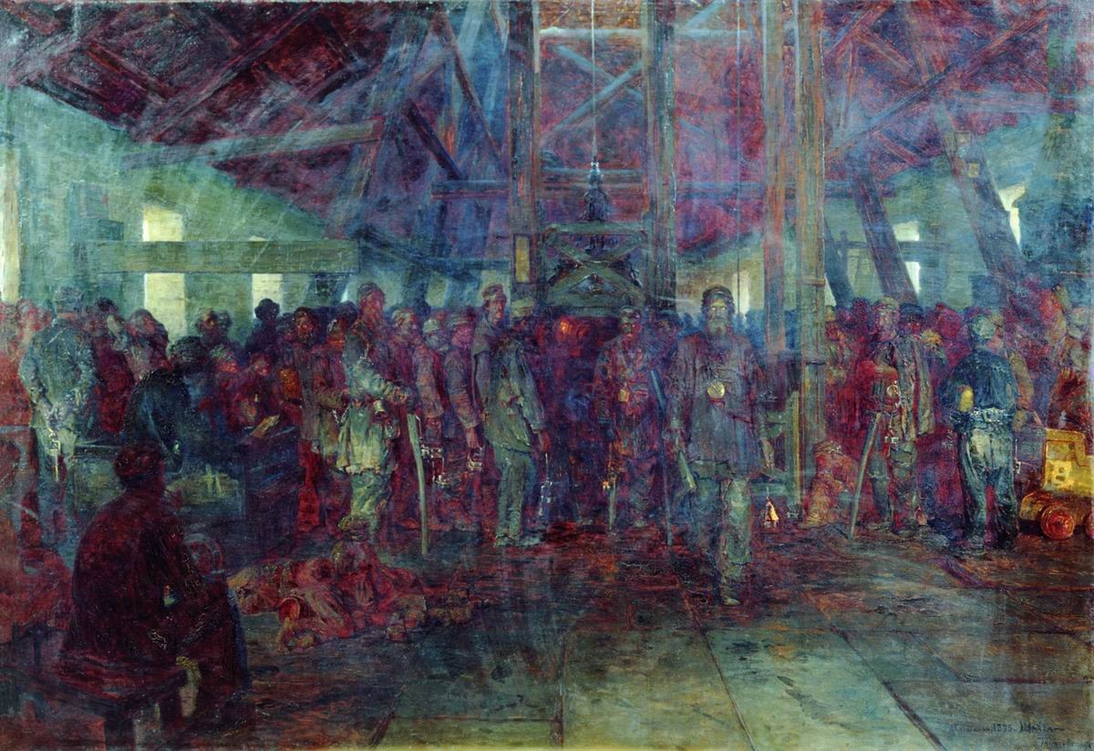 Углекопы. Смена. 1895. Холст, масло. 145x211 см. Государственная Третьяковская галерея, Москва